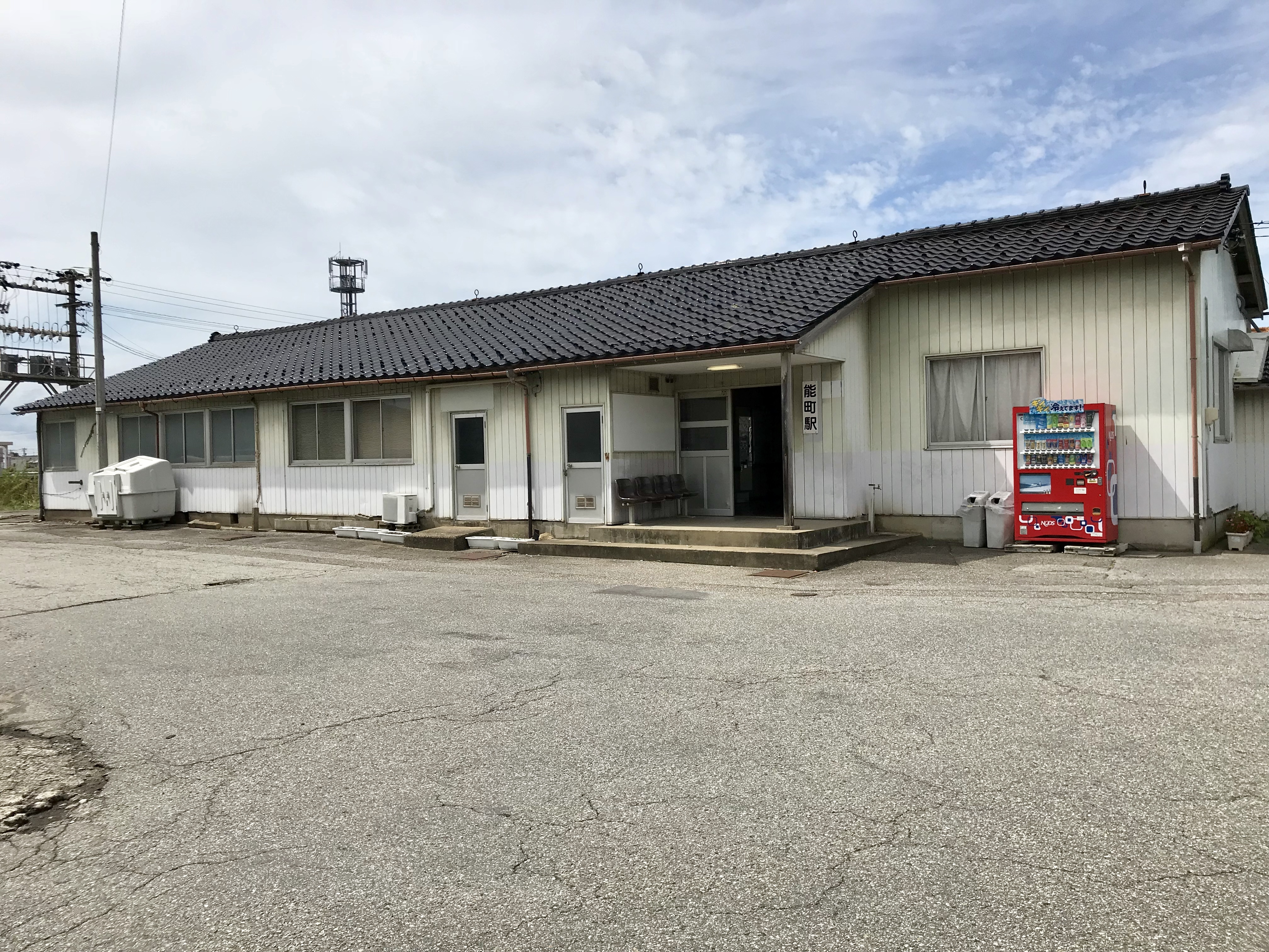 JR西日本氷見線能町駅駅舎